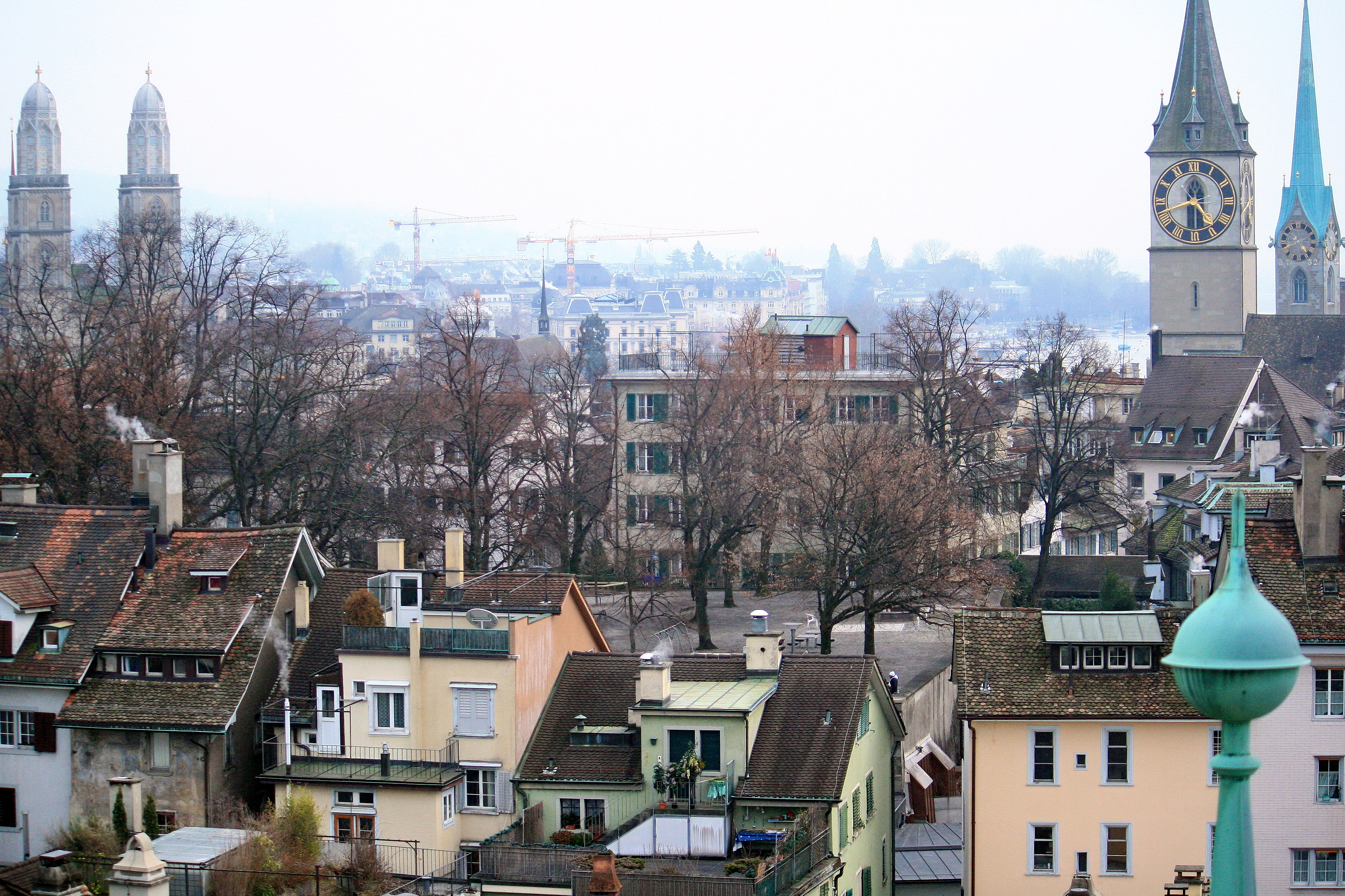 Lindenhof in Zürich (Switzerland) as seen from Urania Sternwarte